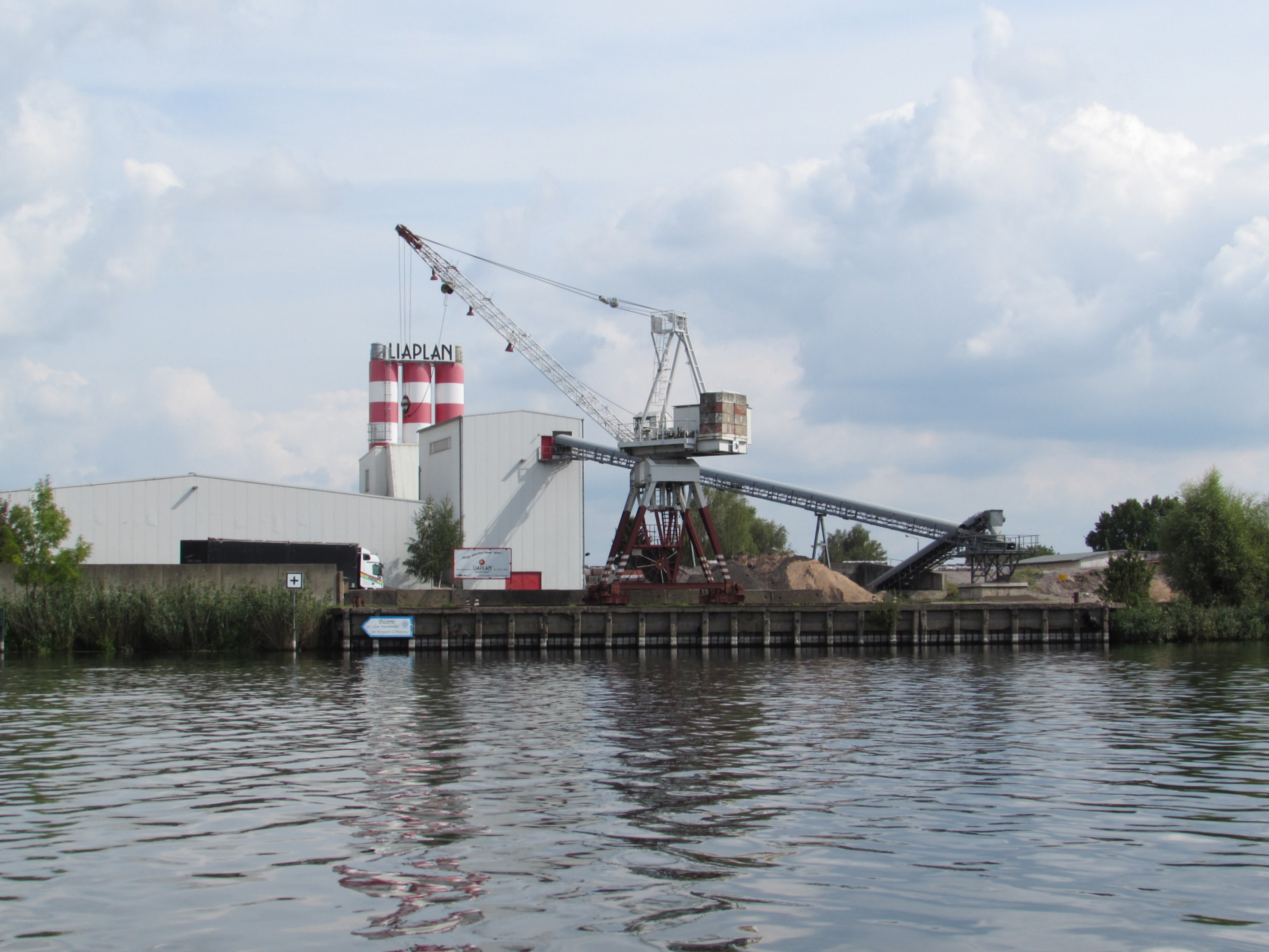 baustoffwerk kranepuhl in havelsee von der havel aus gesehen